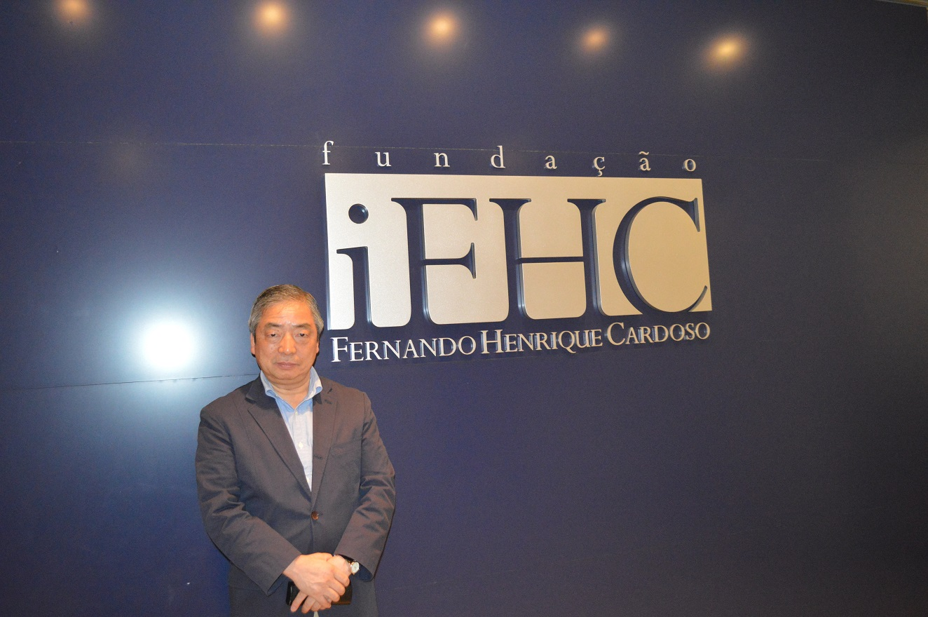 FHC財団訪問